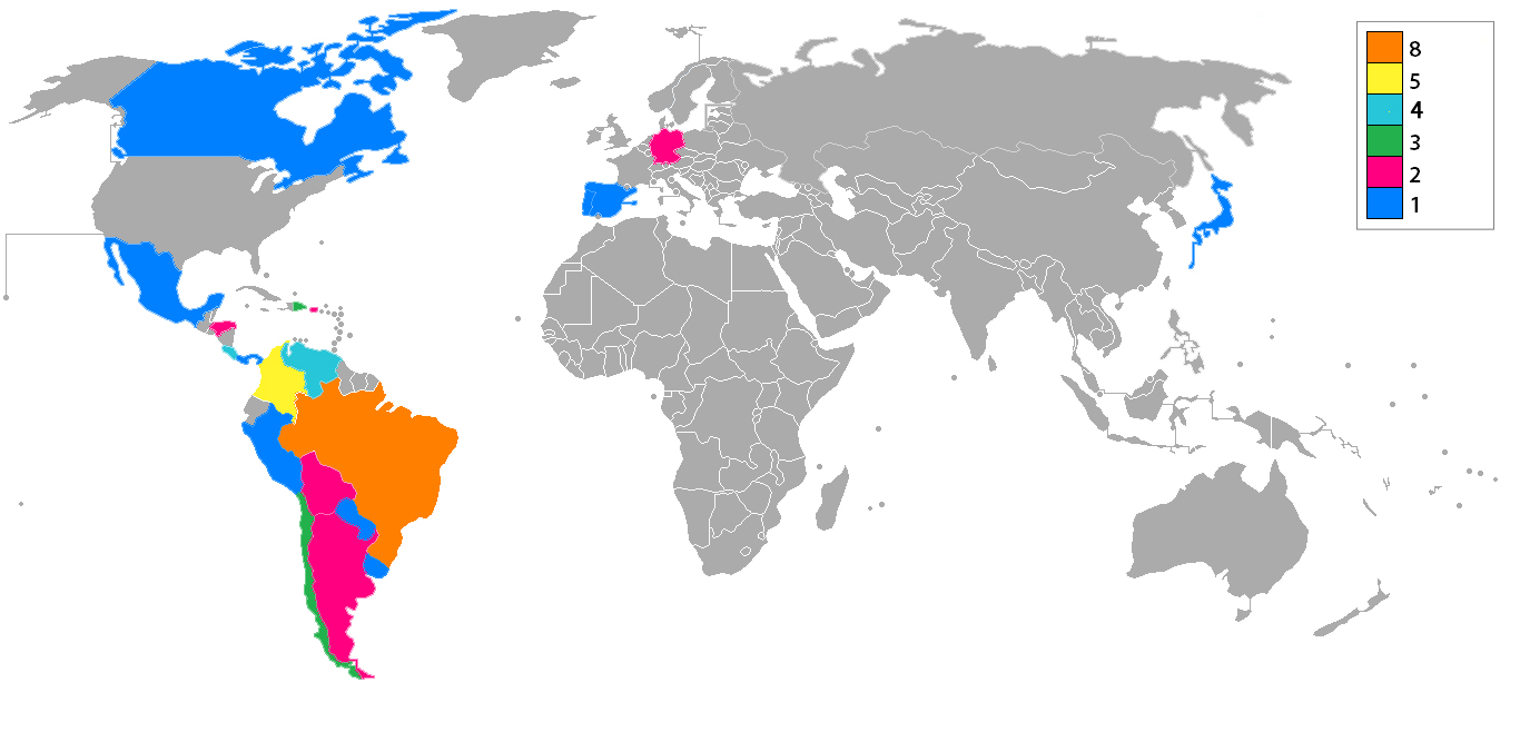 Mapa donde se reflejan los países ganadores del Reinado Internacional del Café